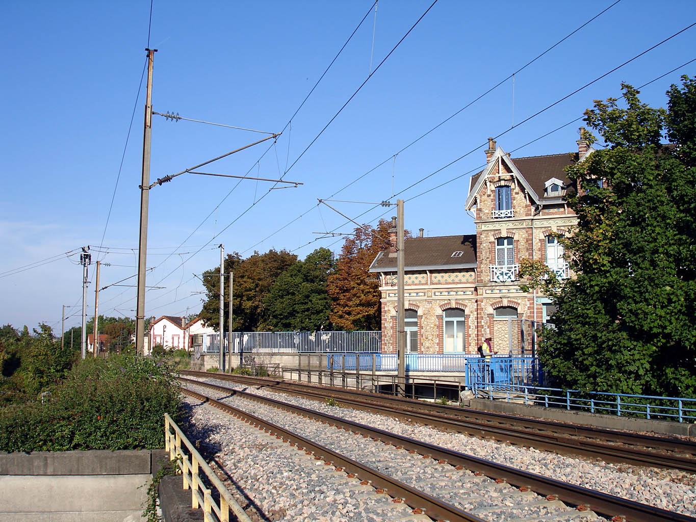 Gare d'Épinay-sur-Seine (Seine-Saint-Denis)